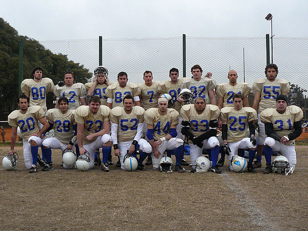 Time do Legionarios no 2007